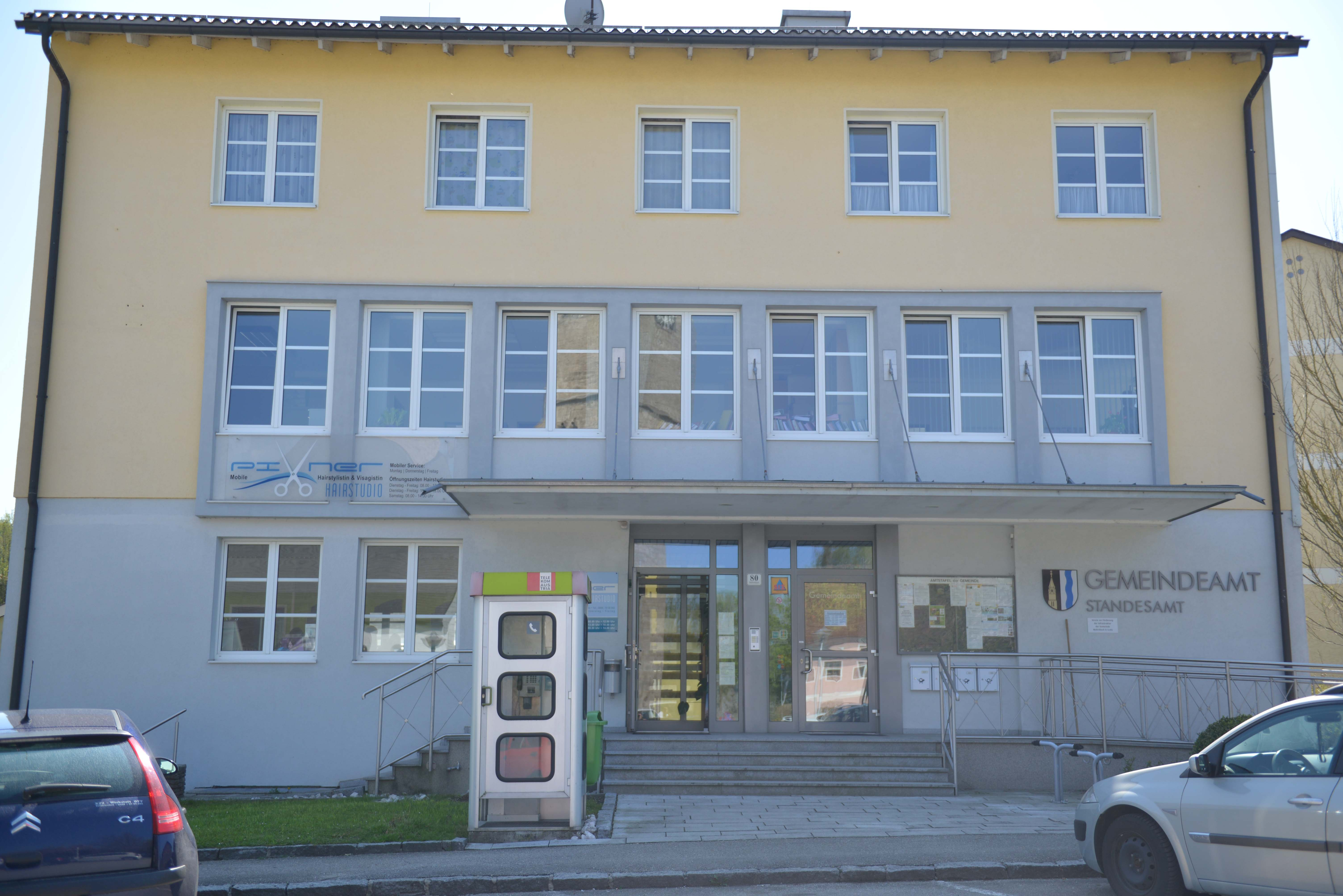 Gemeindeamt Mahrnbach